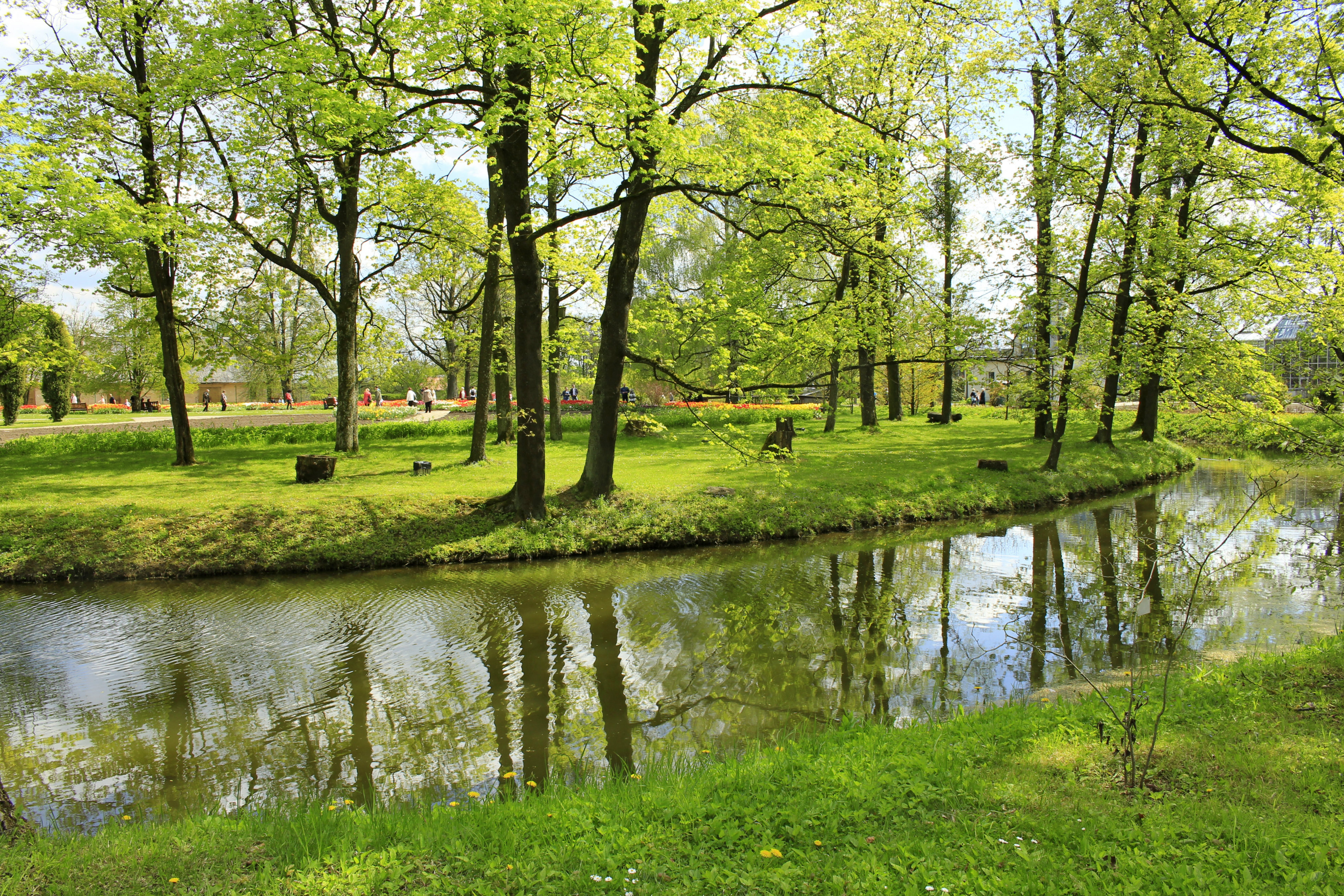 Kauno botanikos sodas